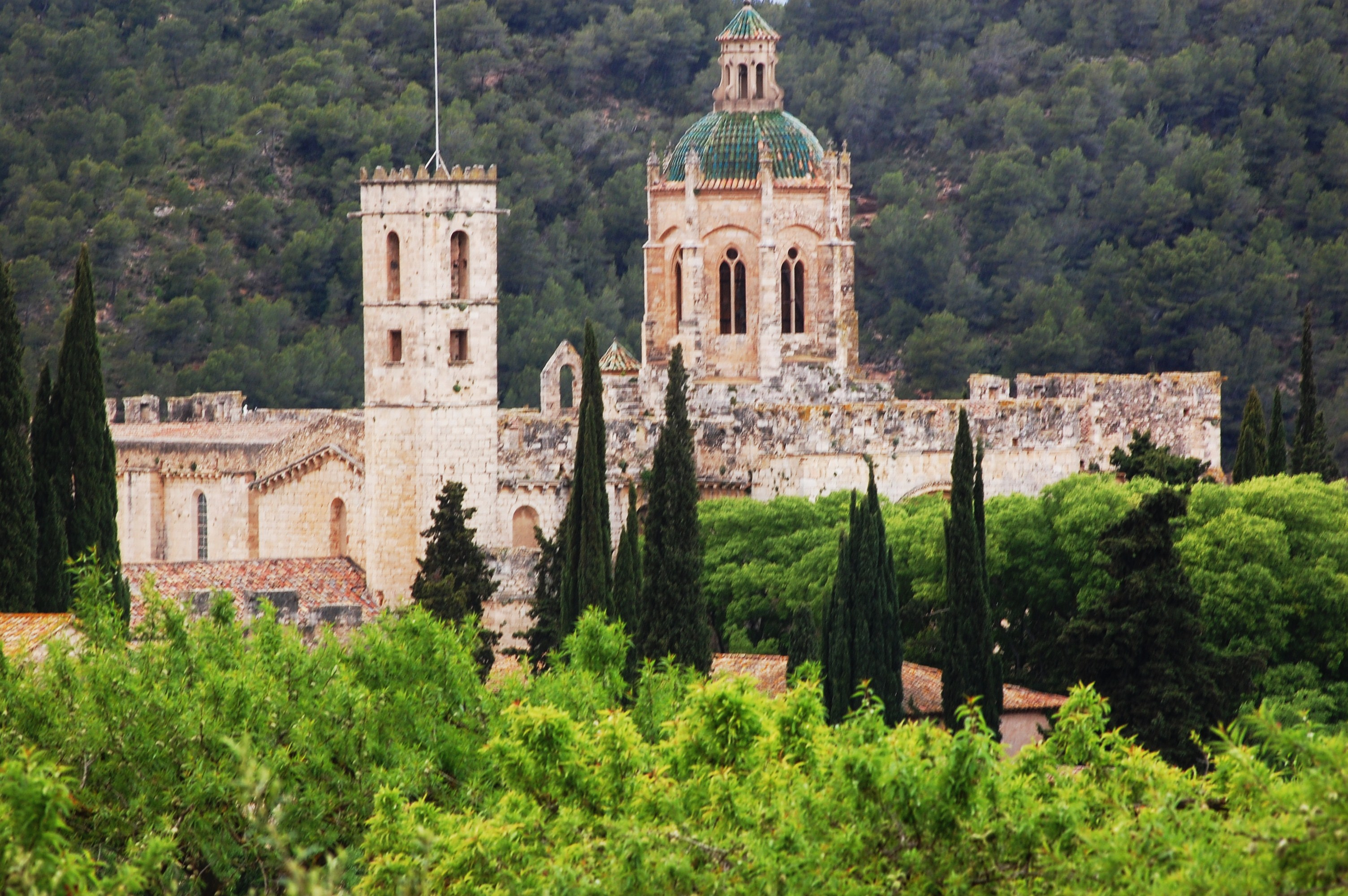 Monestir de Santes Creus (Aiguamúrcia)